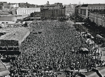 Joukkokokous Hakaniemen torilla (Mahdollisesti Suomen-Neuvostoliiton rauhan ja ystävyyden seuran järjestämä joukkokokous Hakaniemen torilla elokuun alussa 1940.)